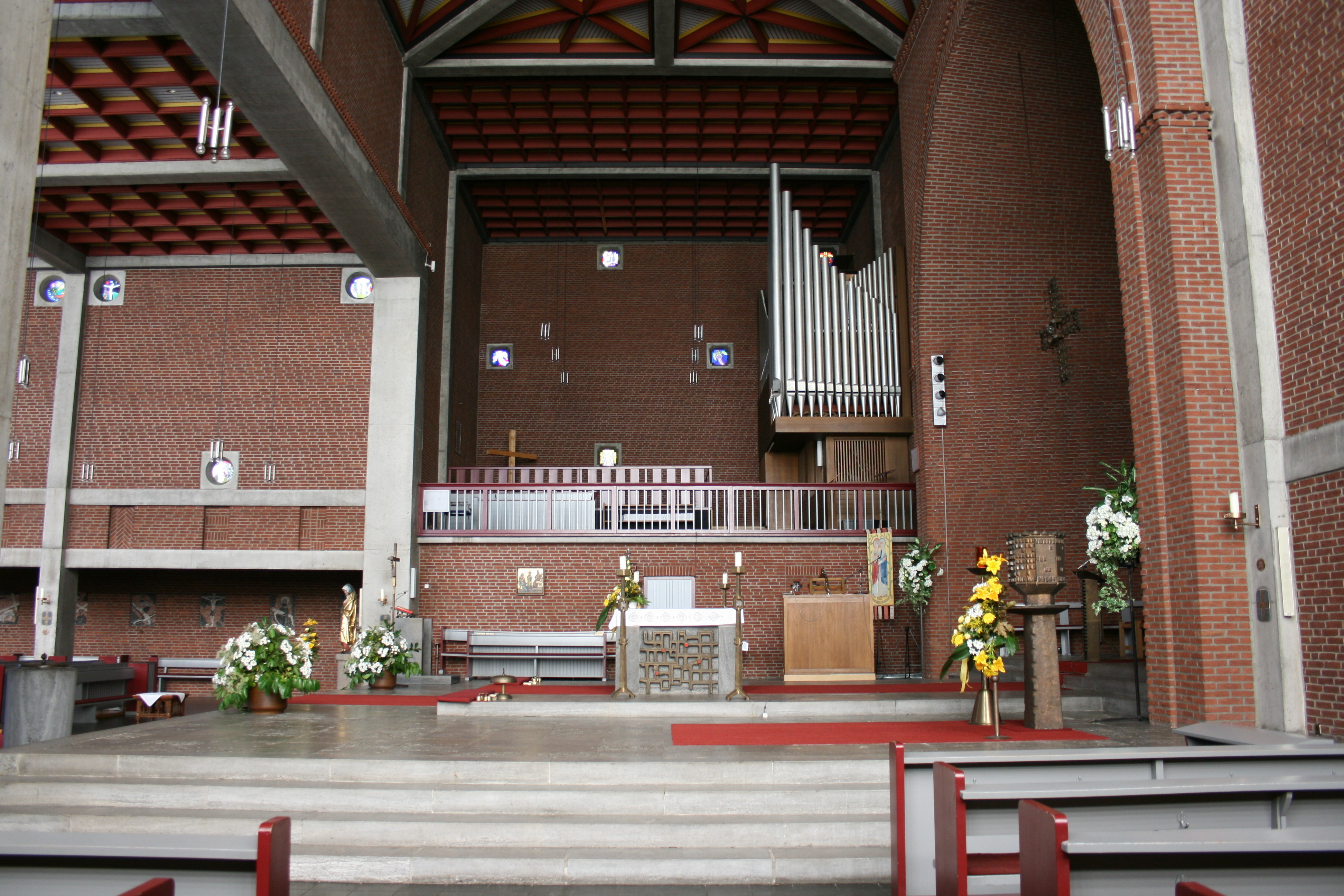 Sankt Laurentius in Uedem